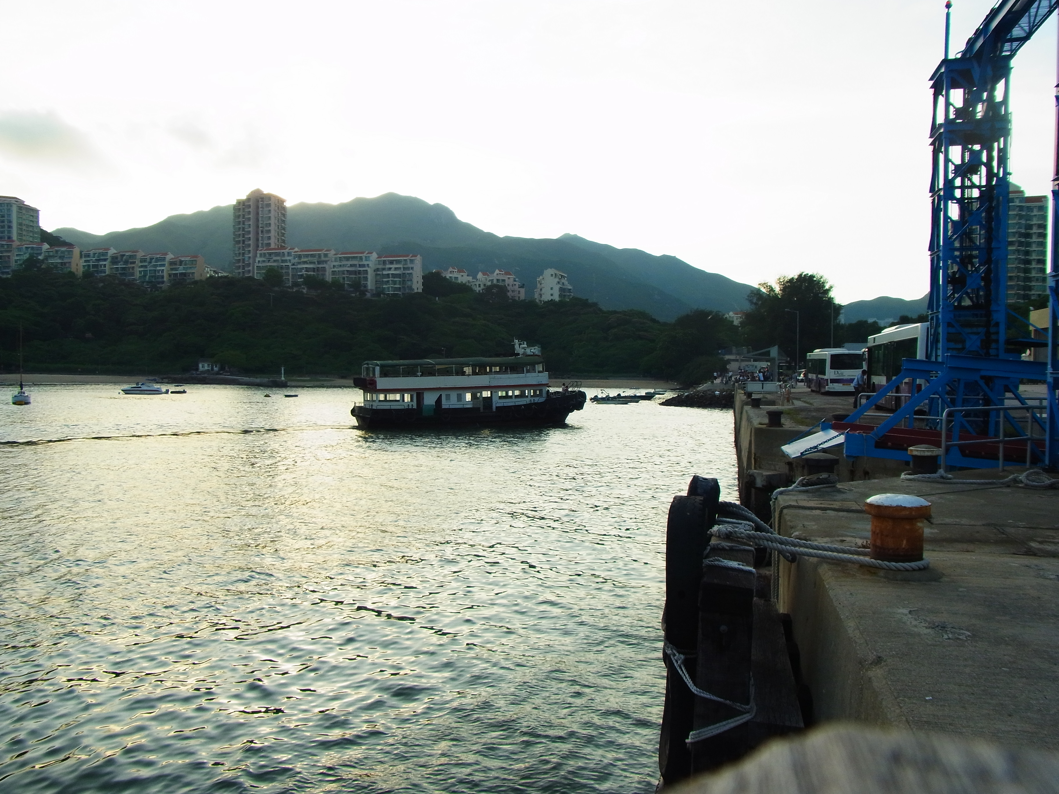 中文（香港）: 街渡碼頭及街渡小船